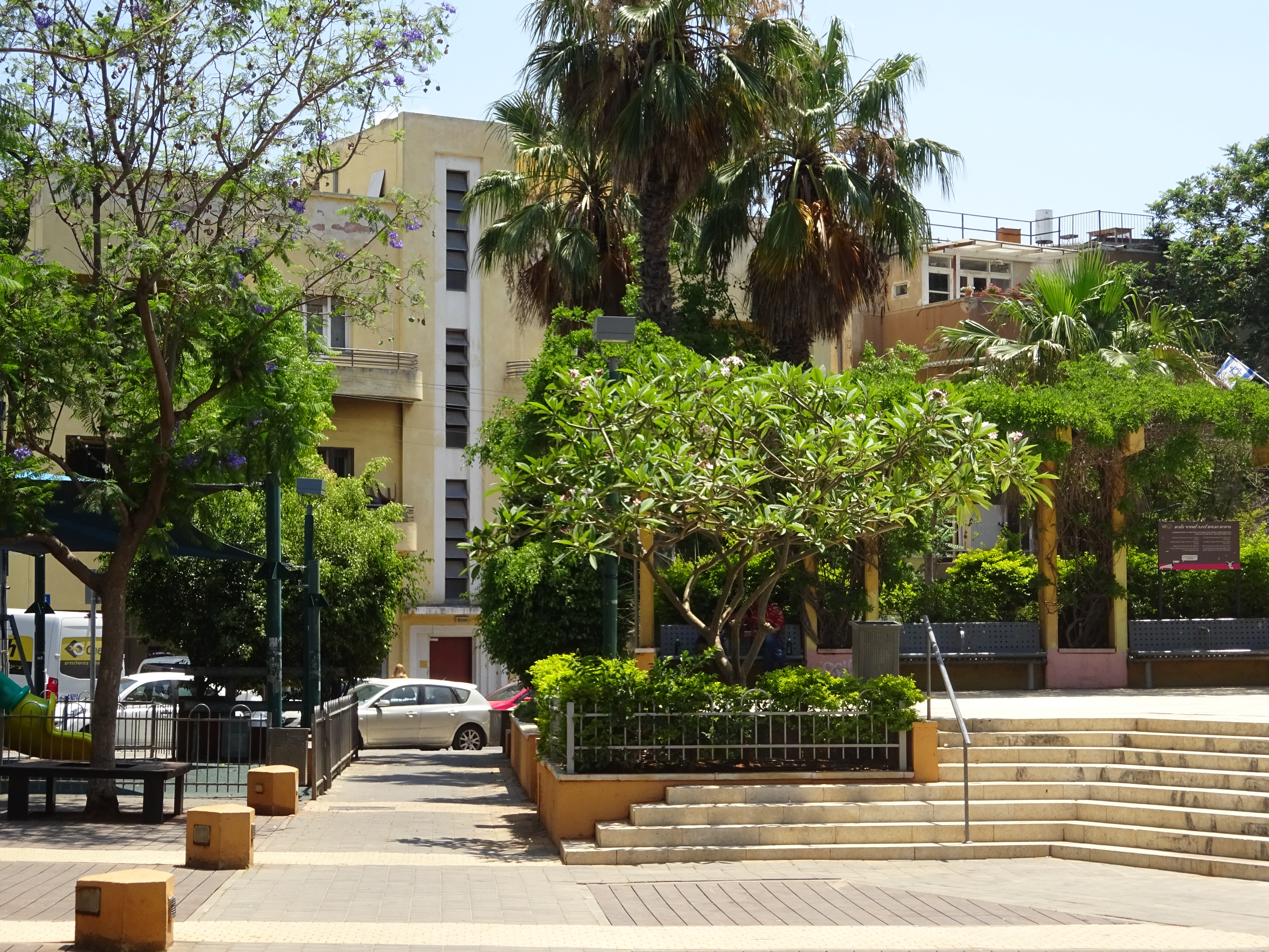 (מבט במרכז הגן מערבה גן החשמל